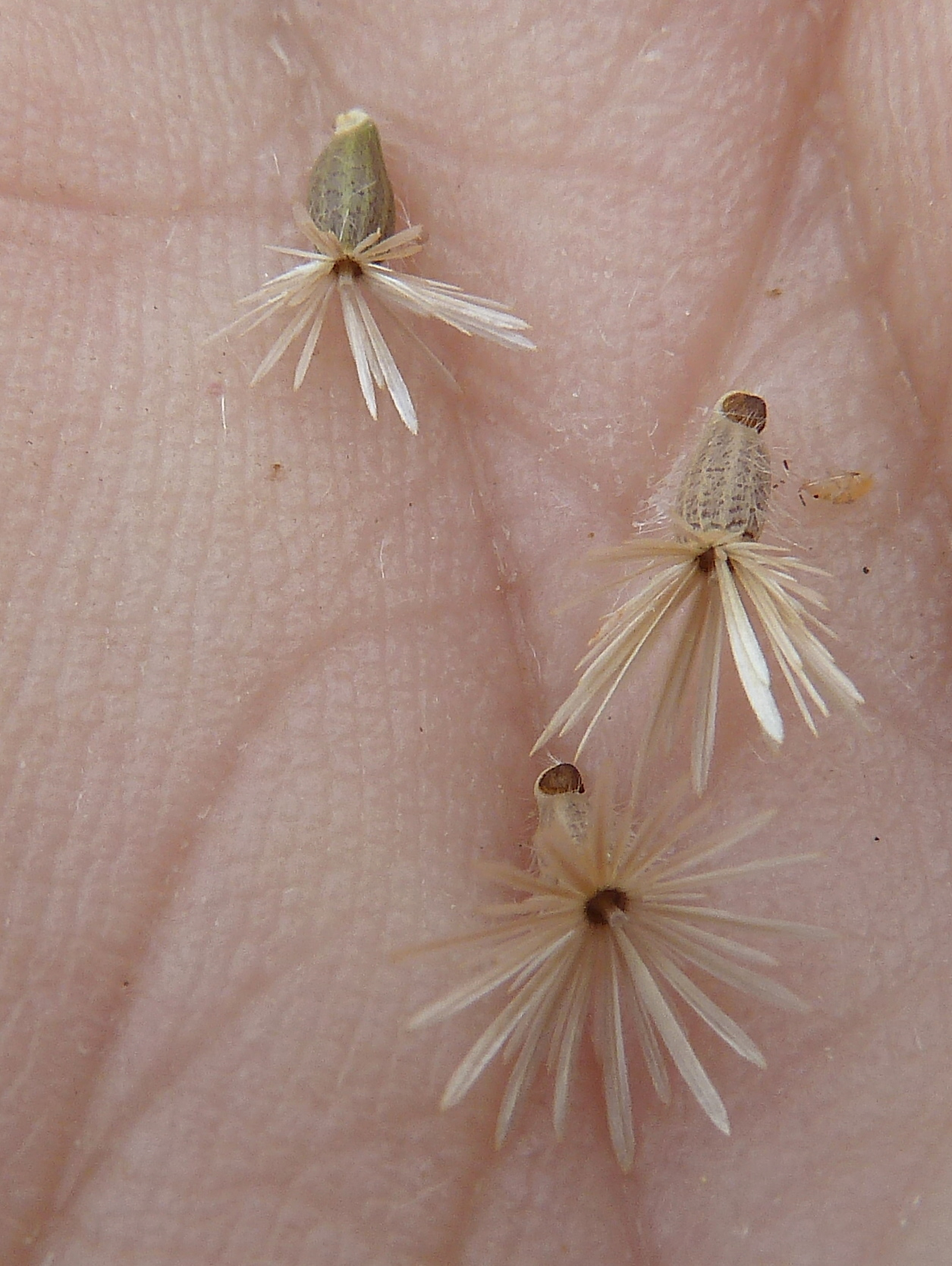 Volutaria tubuliflora - Cipselas sueltas Camino de San Cayetano, Albatera (Provincia de Alicante, España).